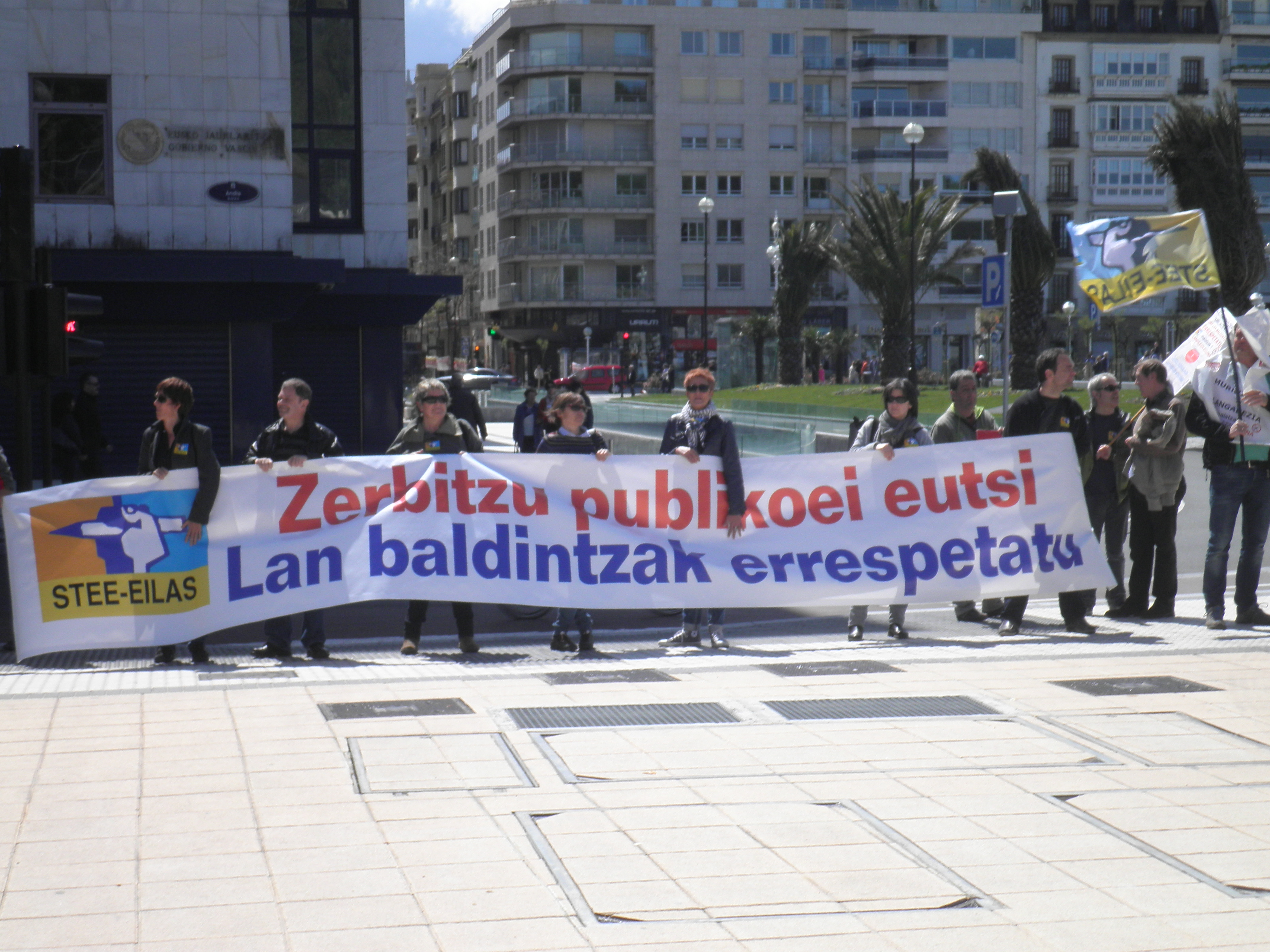 Stee-Eilas sindikatuko kideen protesta 2012ko maiatzaren lehenean, Donostian.